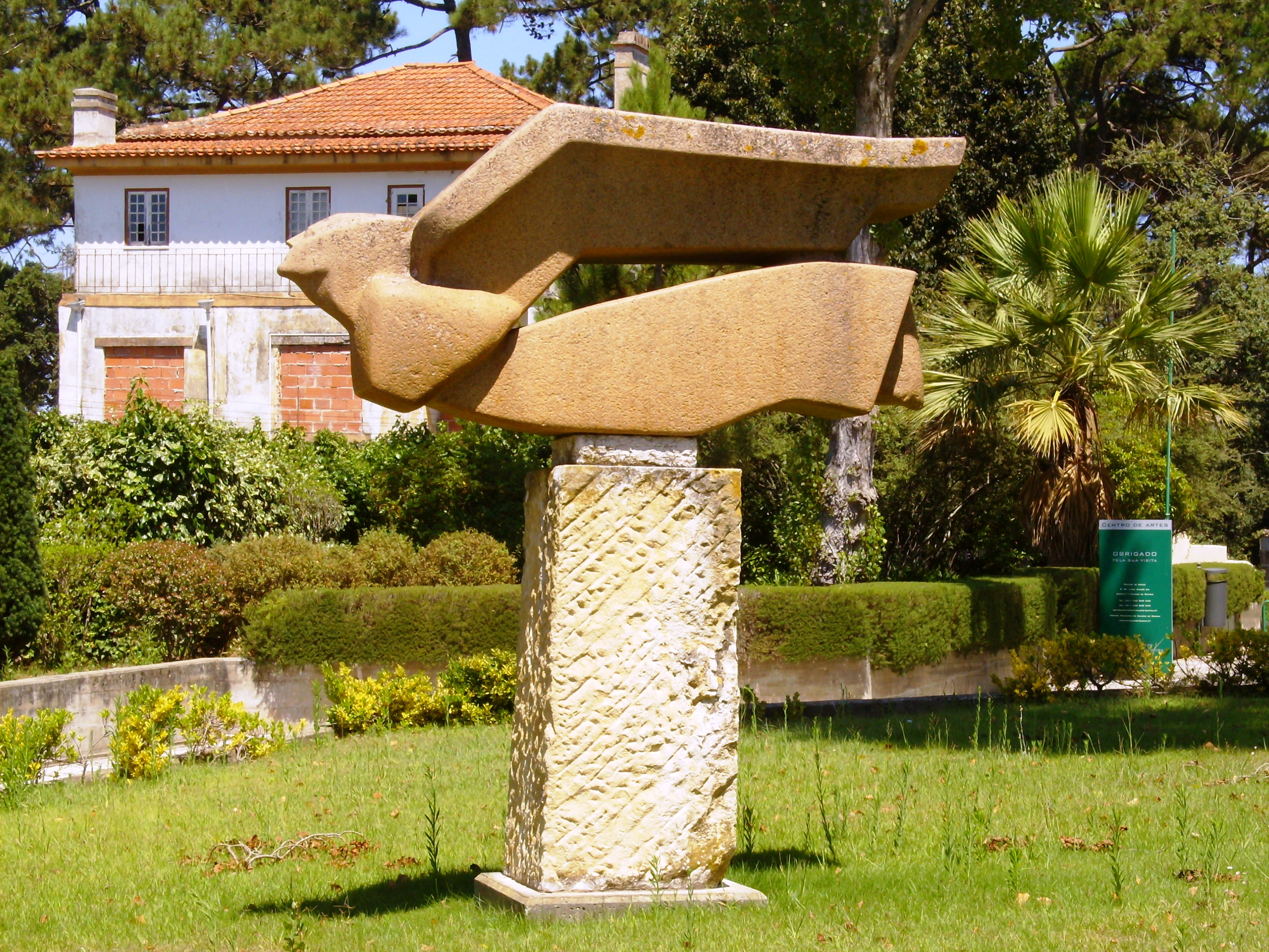 Centro de Artes, Caldas da Rainha, Distrito de Leiria, Portugal: escultura em pedra.